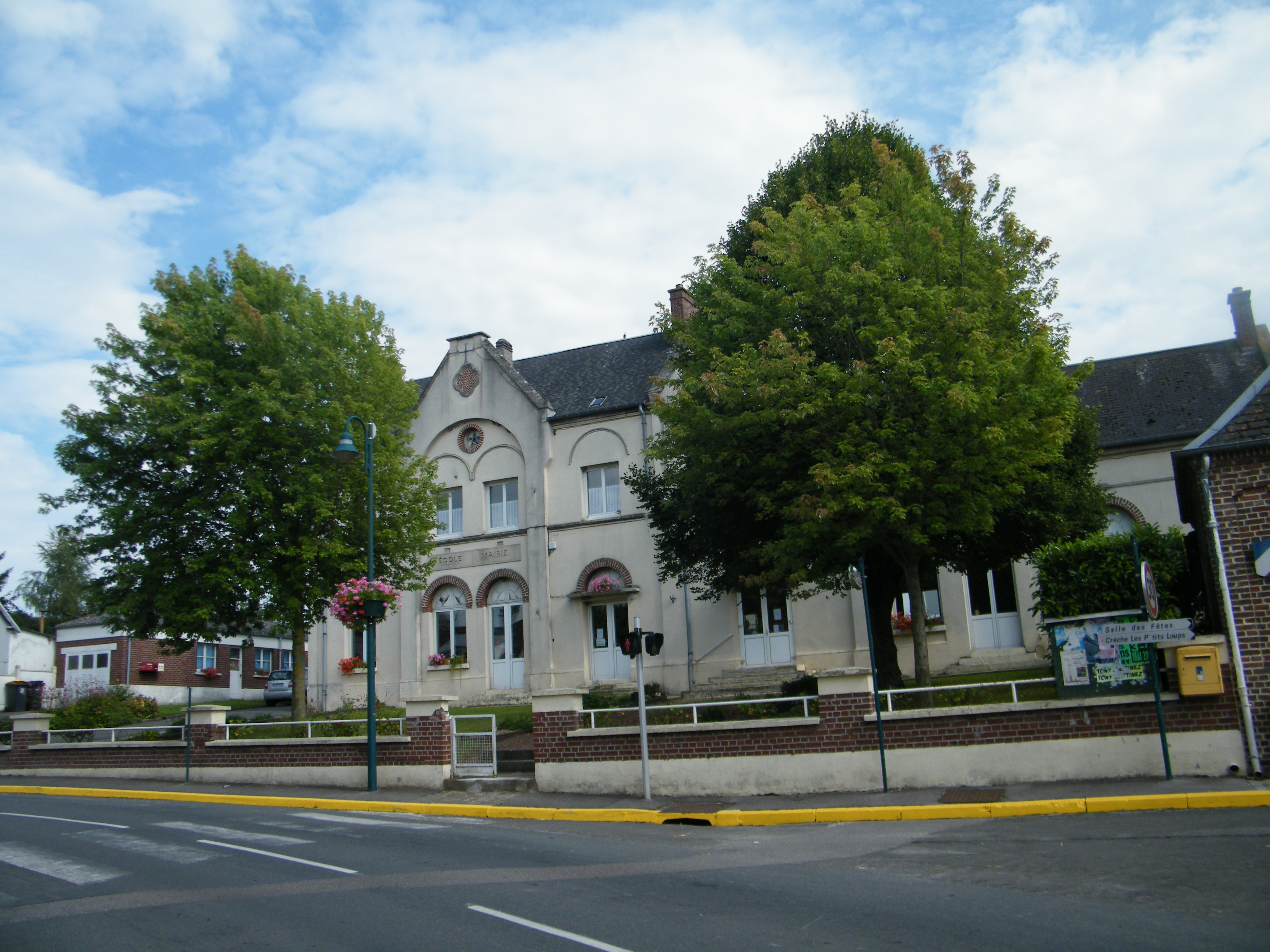 Mairie-école.